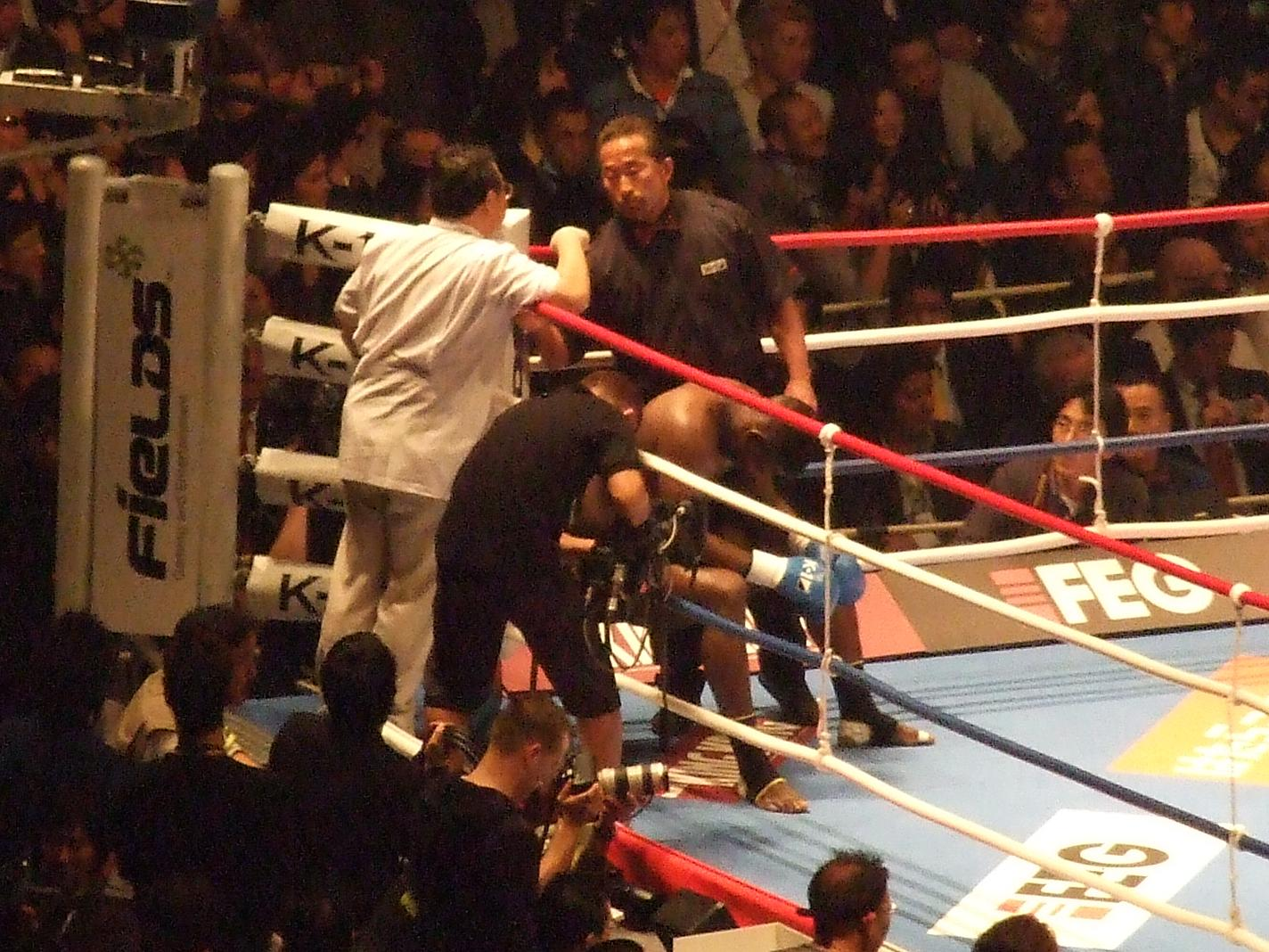 Remy Bonjasky durante la final del World GP Final 2008 justo antes de ser descalificado Badr Hari.